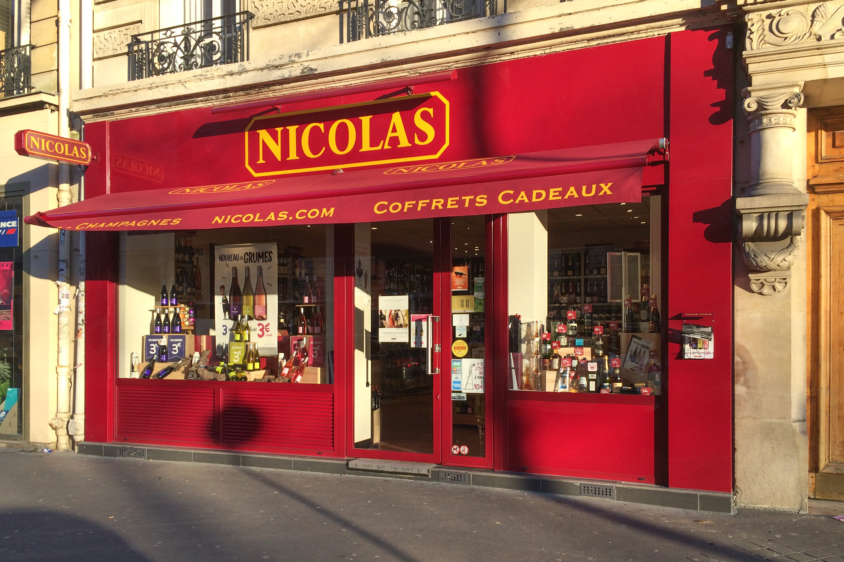 Cave Nicolas Trocadéro située 93 Avenue Kléber dans le XVIème arrondissement